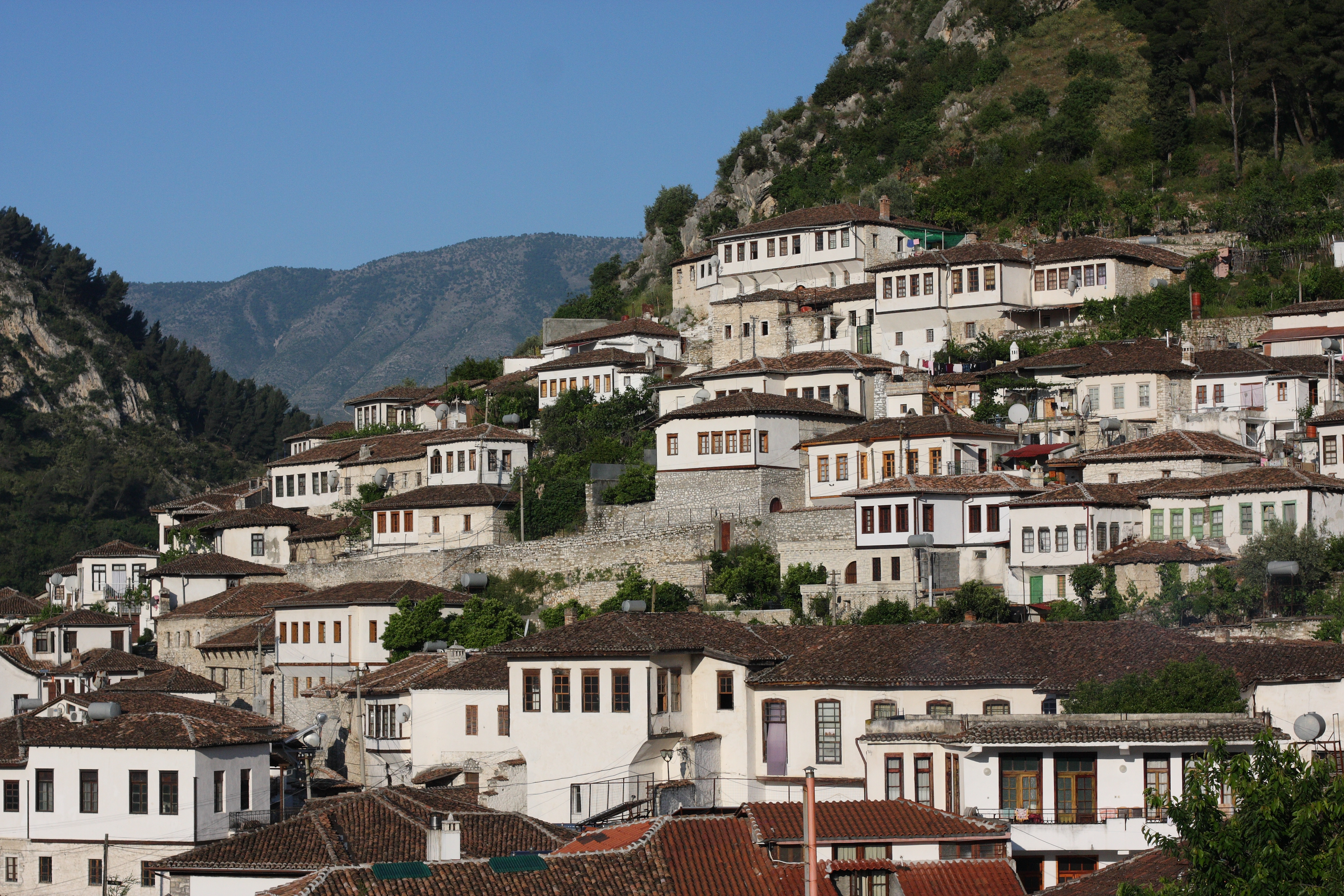 Berat, Albania